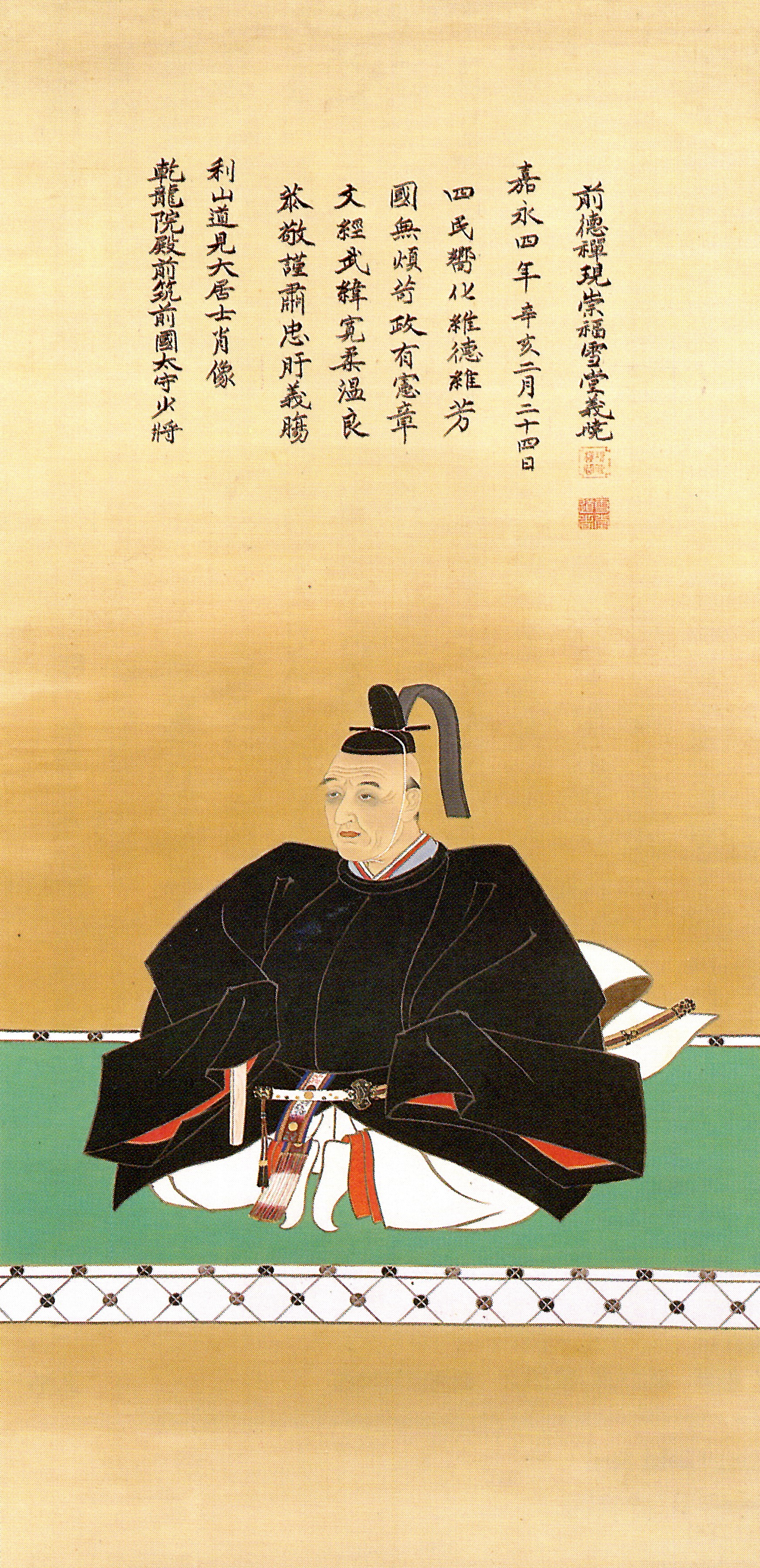 黒田斉清の肖像。